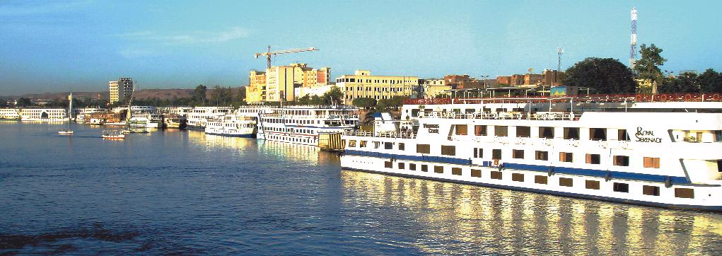 Porto de Assuan.